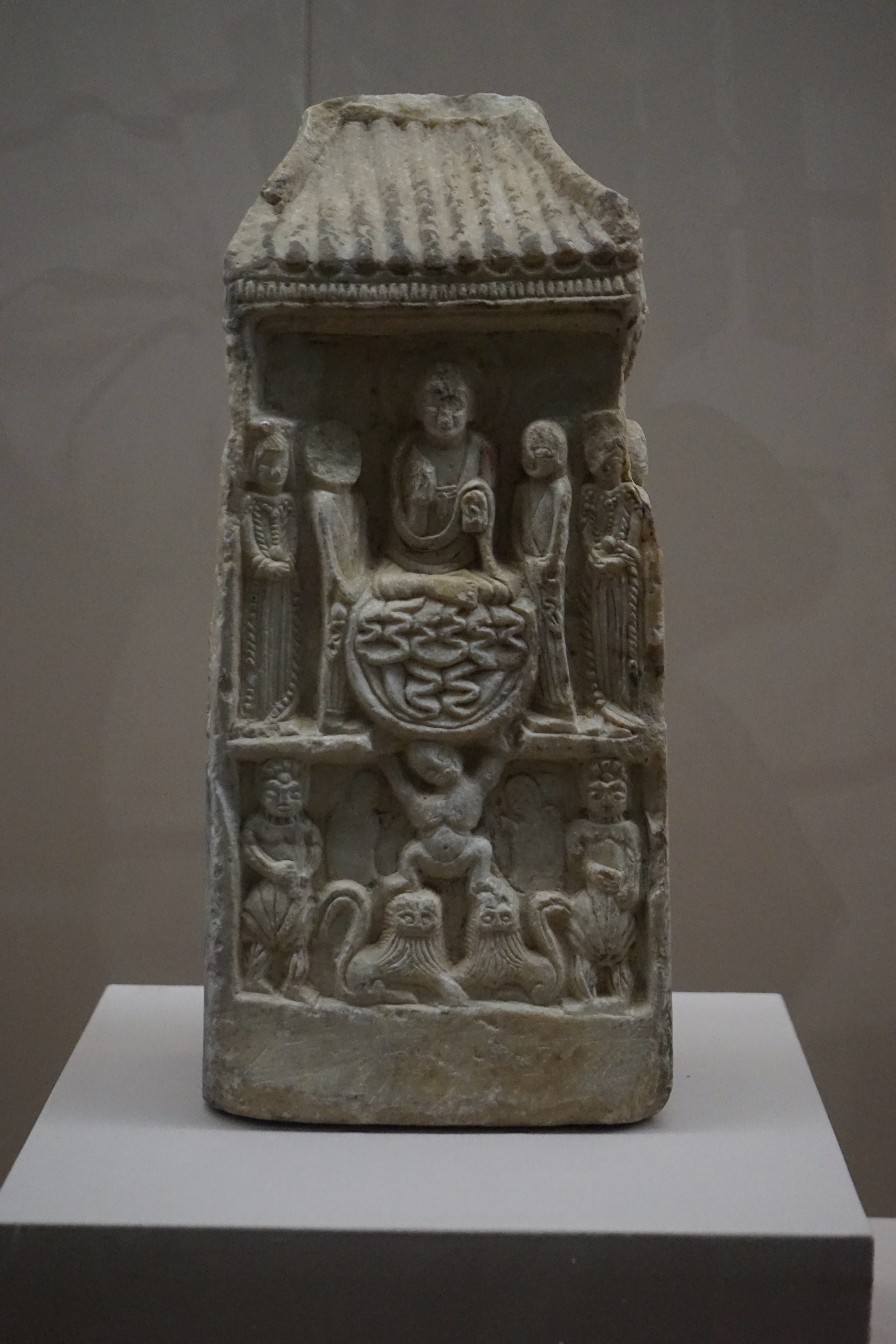 中文（中国大陆）: 白玉四面佛龛，唐代，周至县博物馆藏